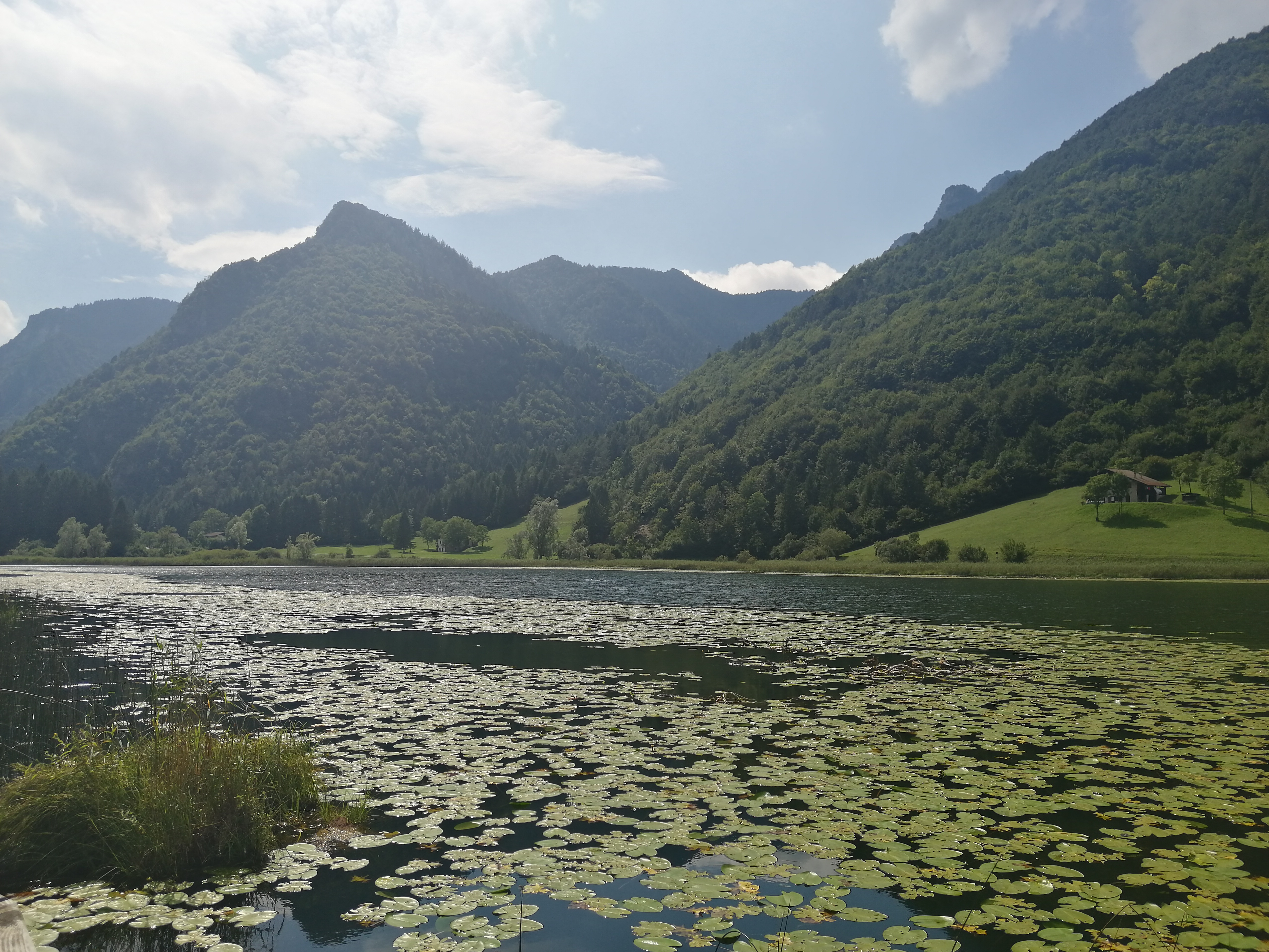 Foto del lago D'Ampola